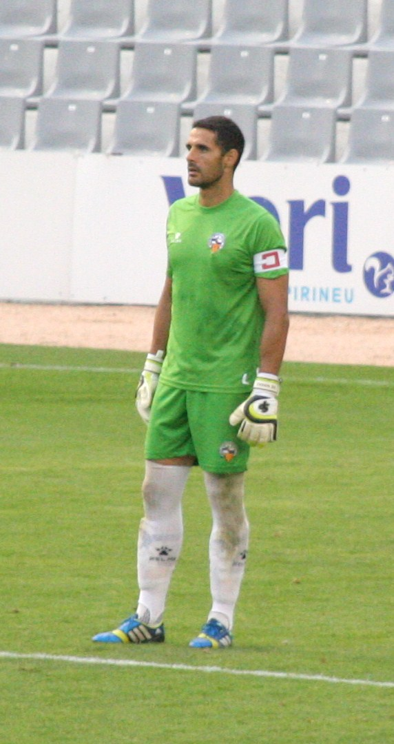 David de Navas Alcalá